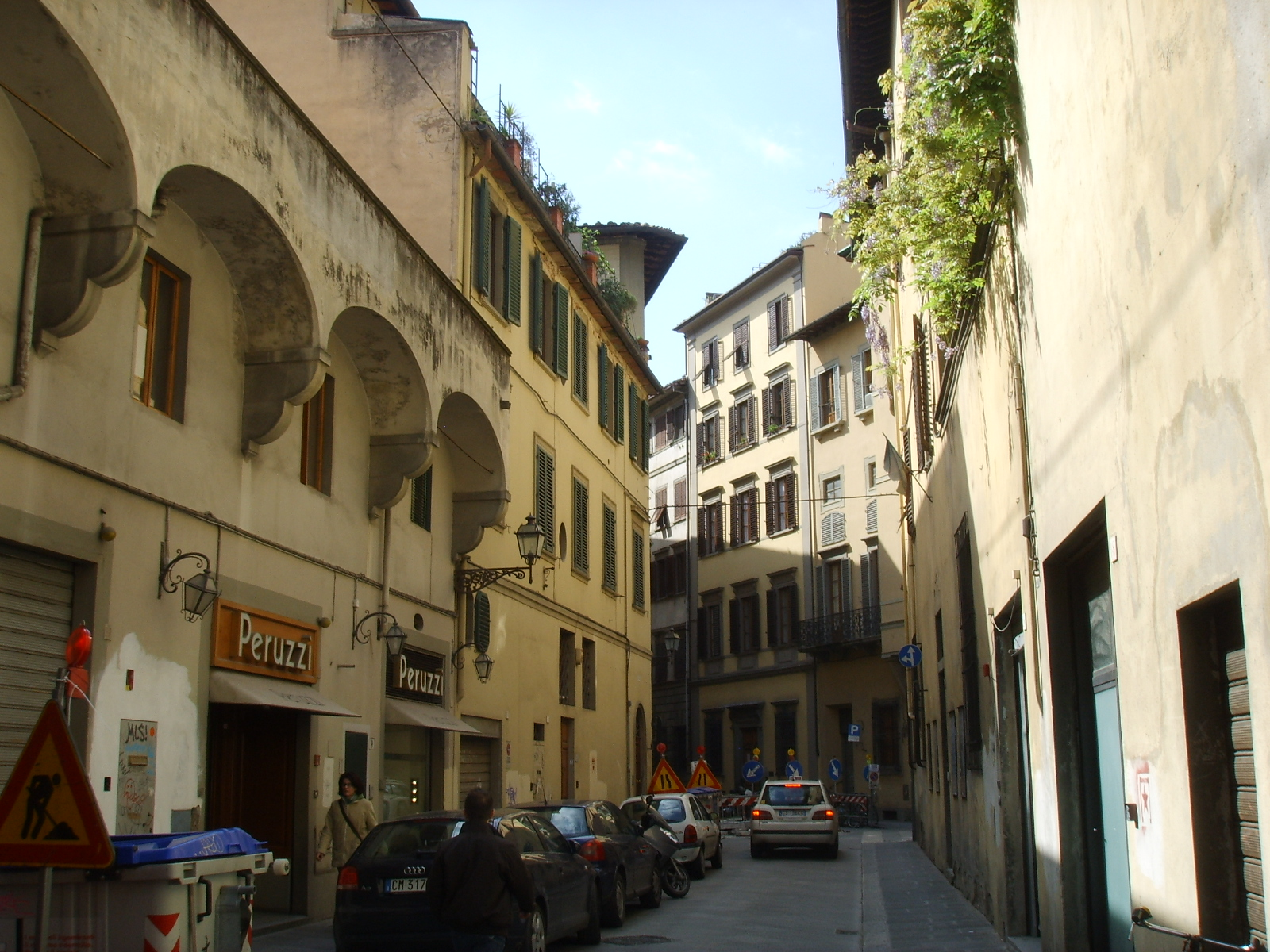 Via dell'anguillara (parlascio)